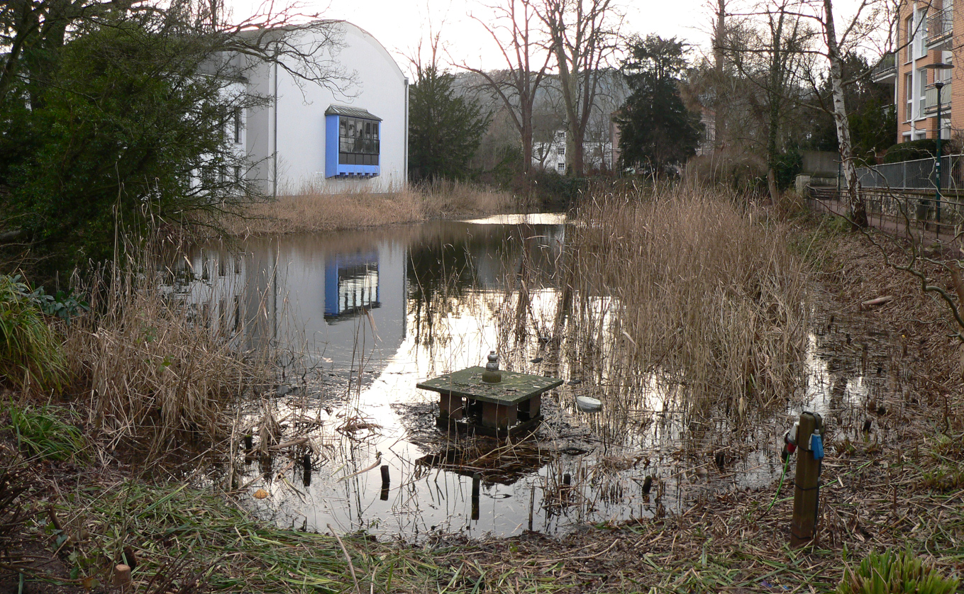 Lüdersteich in Hameln als letzter Rest des Wassergrabens der Festung Hameln